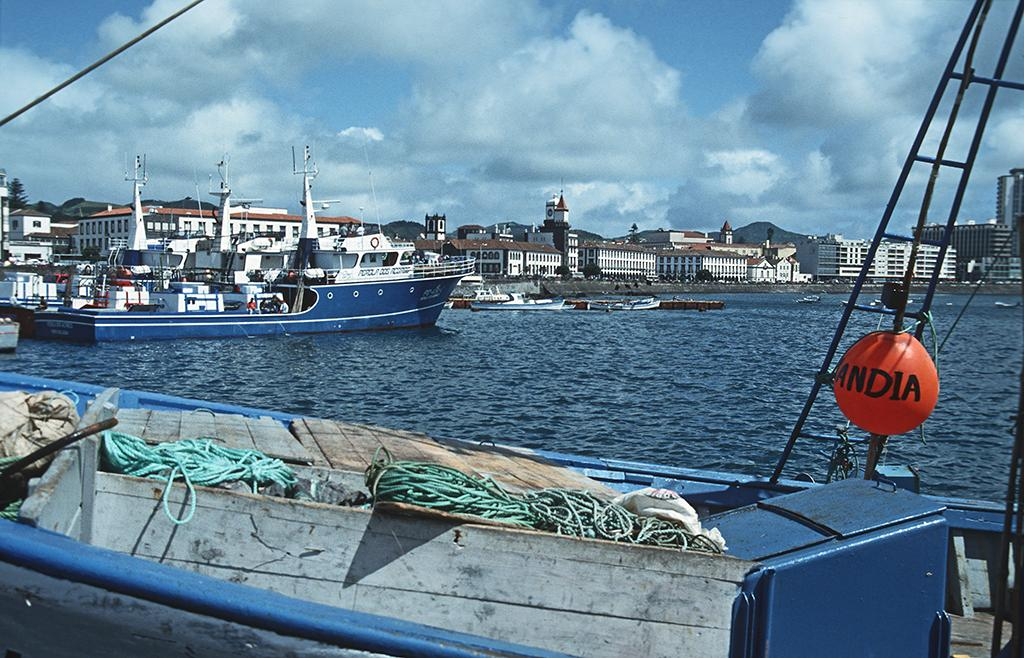 Azoren, Sao Miguel, Ponta Delgada Url